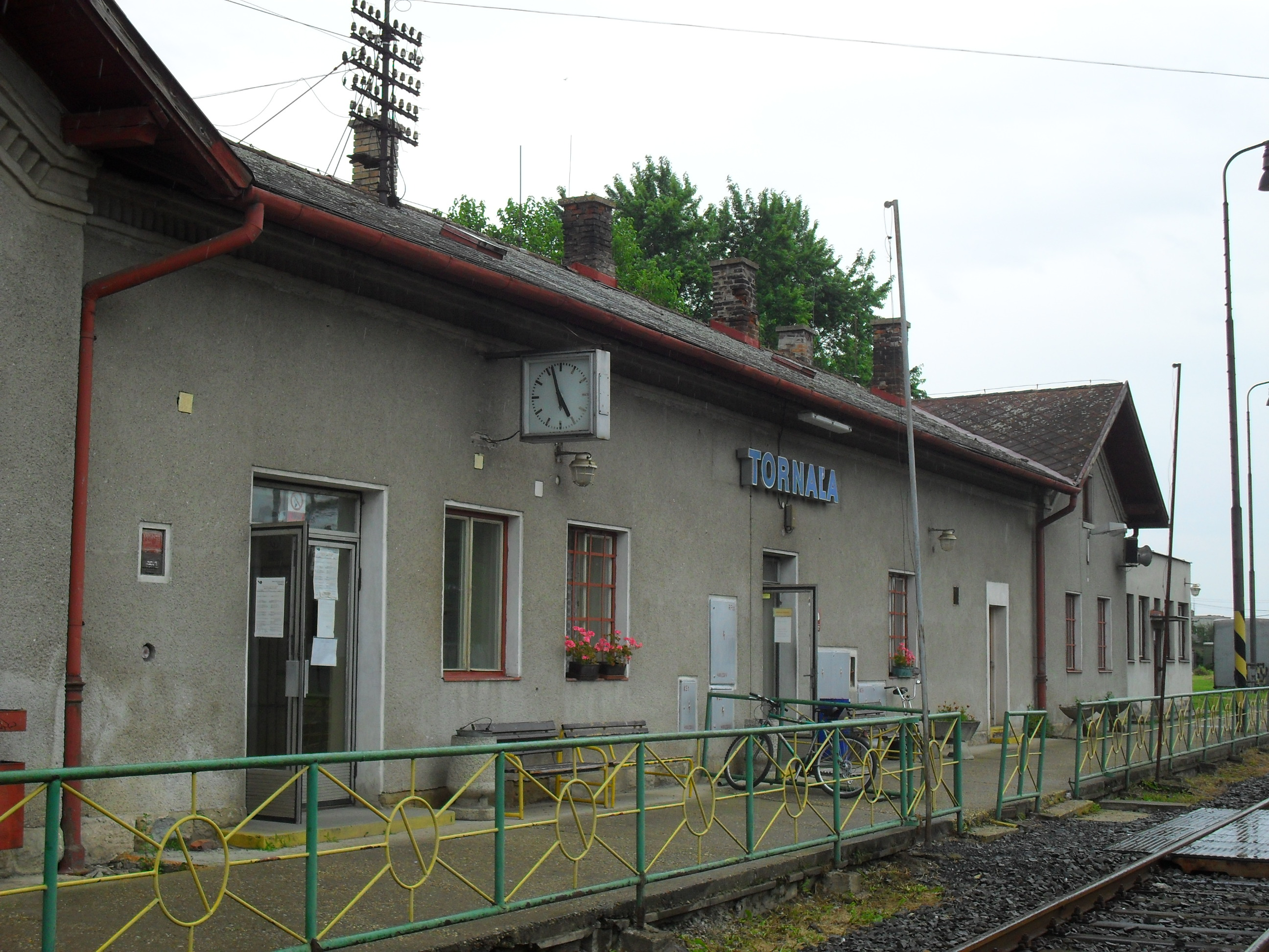 Tornalja - vasútállomás